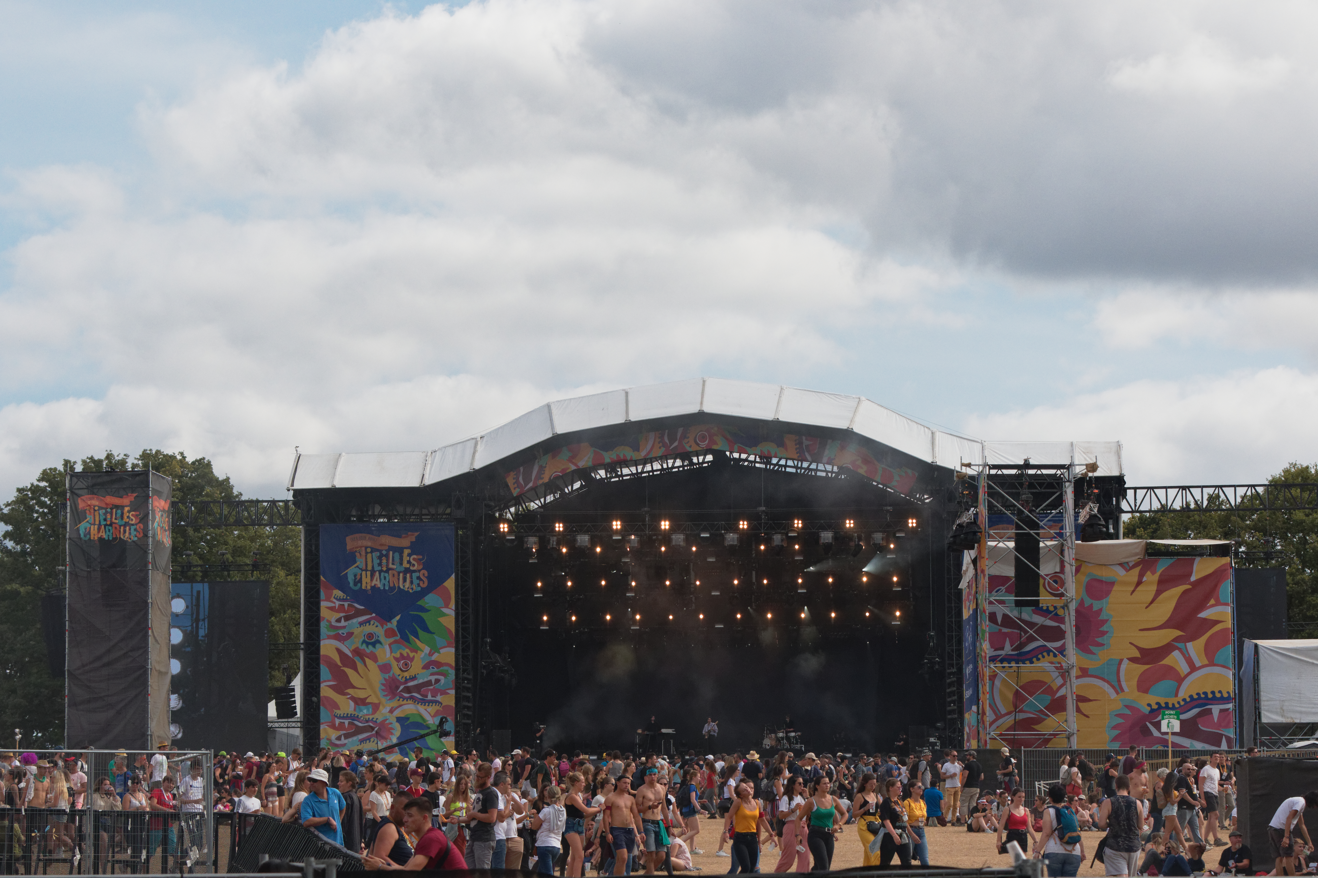 Vue du festival des vieilles charrues 2019.